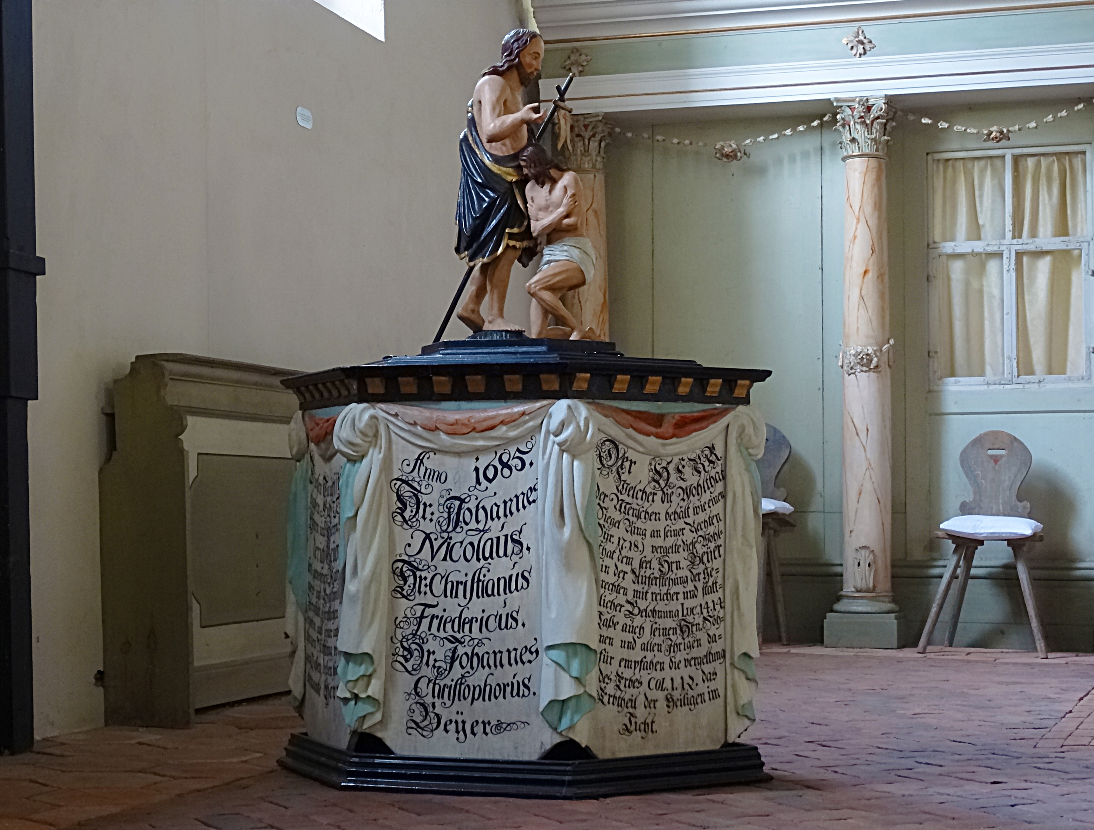 sechseckiger Tauftisch in der Dorfkirche St. Laurentius Kirchheim mit Stifter- und anderen Inschriften von 1685